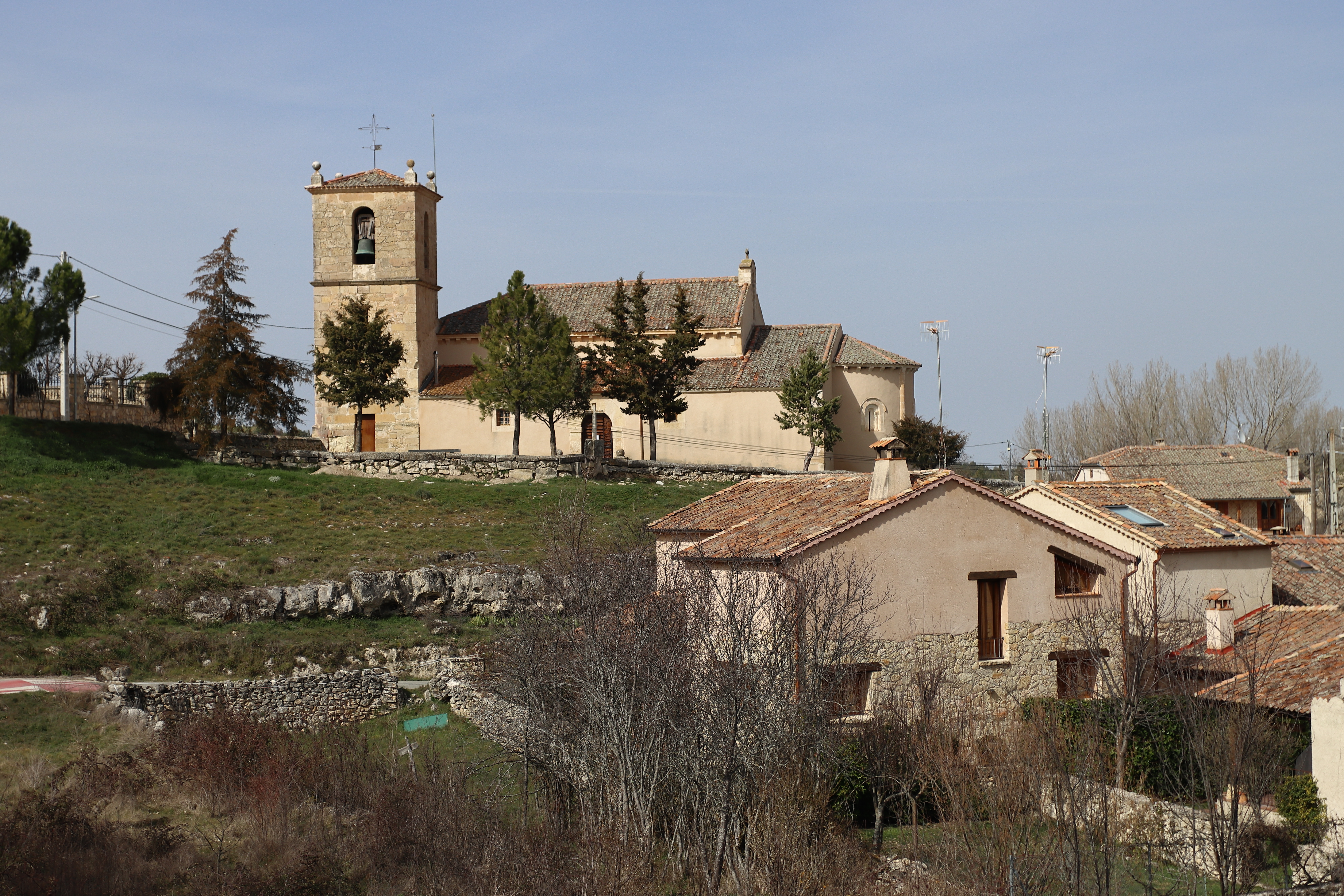 Cubillo, Iglesia de San Juan